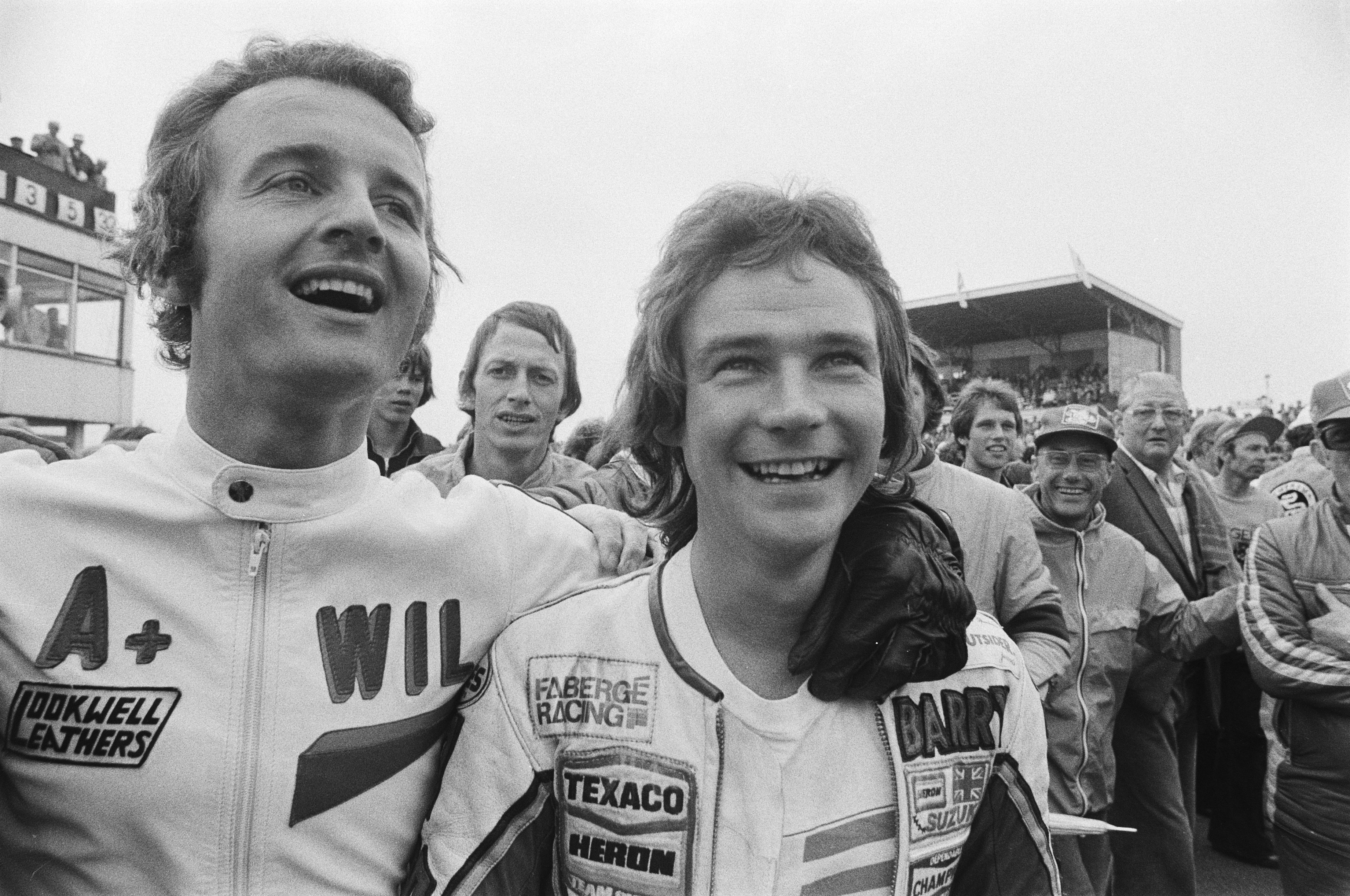 Collectie / Archief : Fotocollectie Anefo Reportage / Serie : TT Assen 1977 Beschrijving : TT Assen; Wil Hartog (l) met Barry Sheene (2e) na afloop Datum : 25 juni 1977 Locatie : Assen Trefwoorden : motorcoureurs, motorsport Persoonsnaam : Hartog, Wil, Sheen, Barry Fotograaf : Suyk, Koen / Anefo Auteursrechthebbende : Nationaal Archief Materiaalsoort : Negatief (zwart/wit) Nummer archiefinventaris : bekijk toegang 2.24.01.05 Bestanddeelnummer : 929-2419